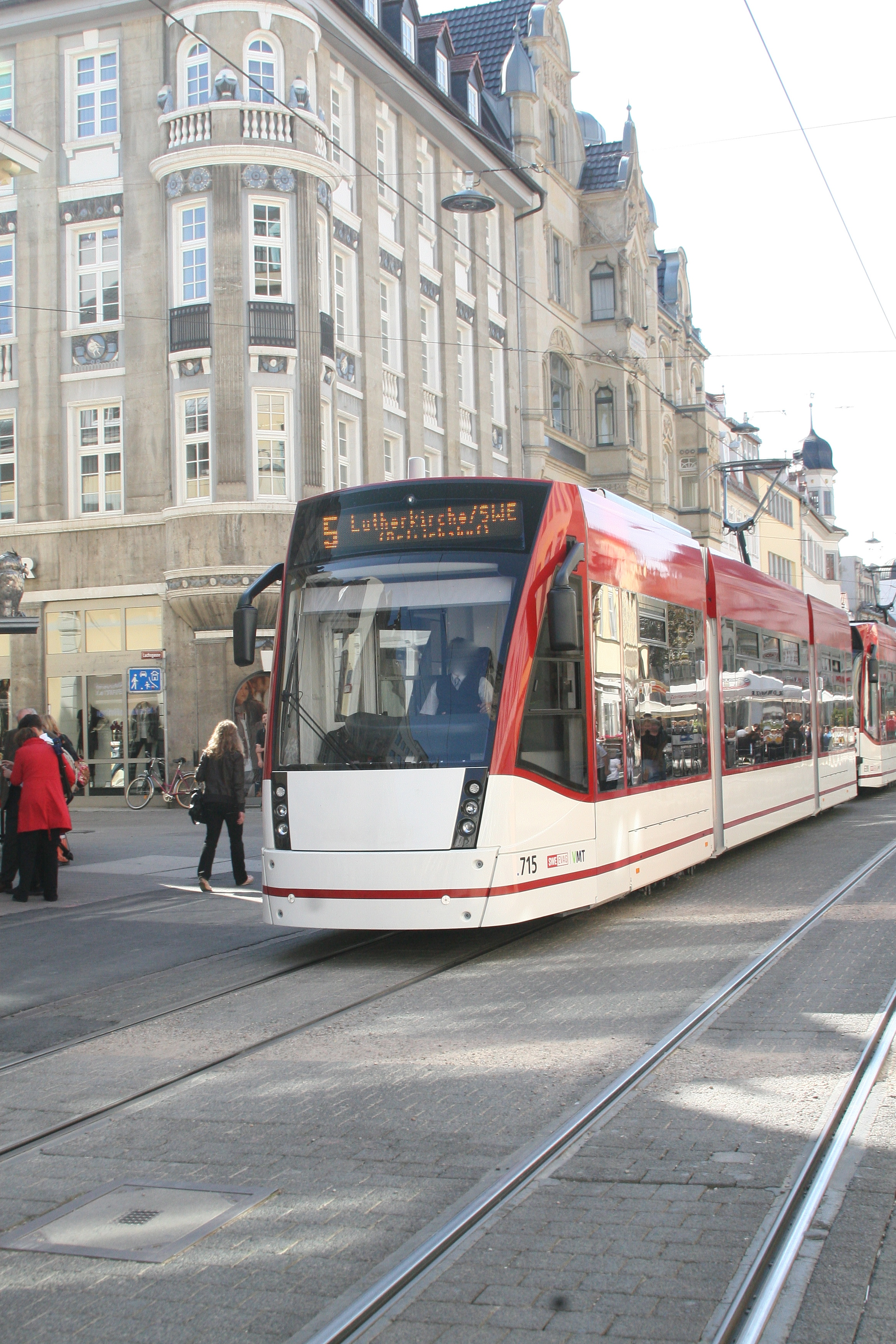 Tw 715 auf Linie 5 Richtung Lutherkirche / SWE (Dateiname leider fehlerhaft) (Sonderverkehr zum Papstbesuch)